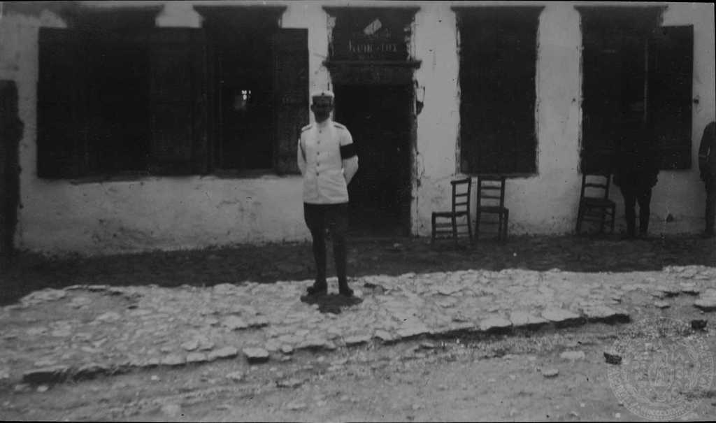 Константинос І Гръцки